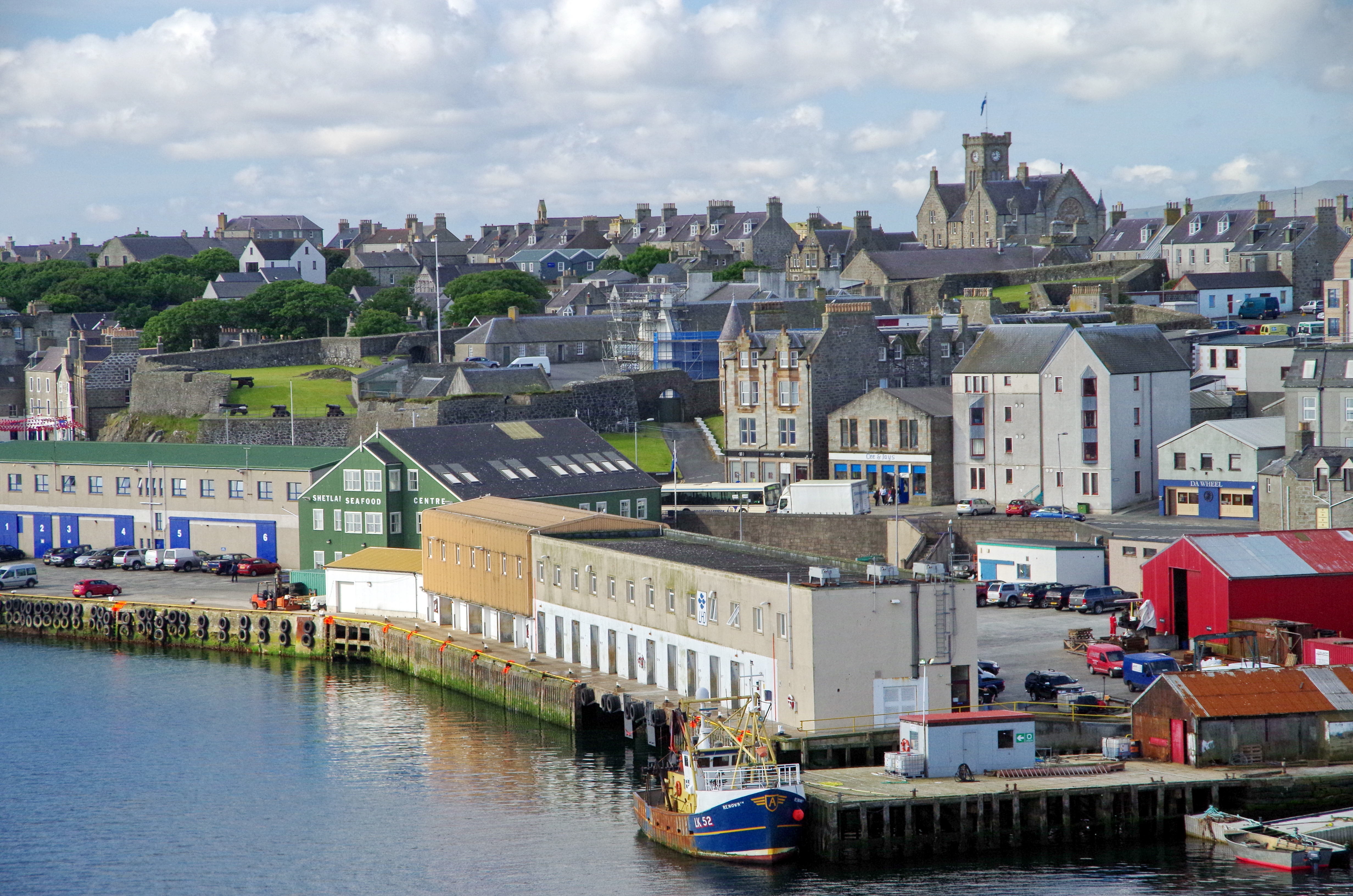 Blick vom Schiff über Lerwick